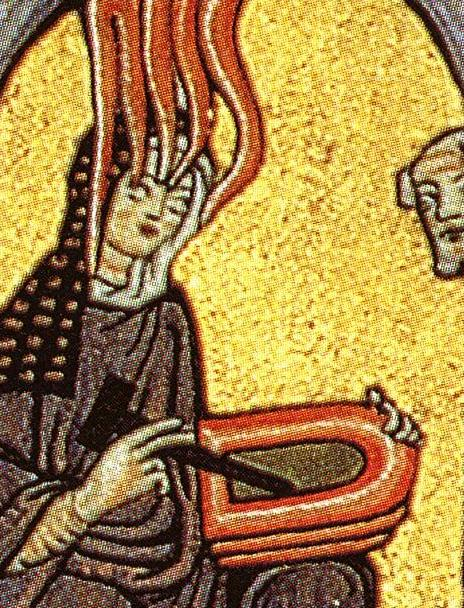 Hildegard von Bingen empfängt eine göttliche Inspiration. Image:Hildegard.jpg